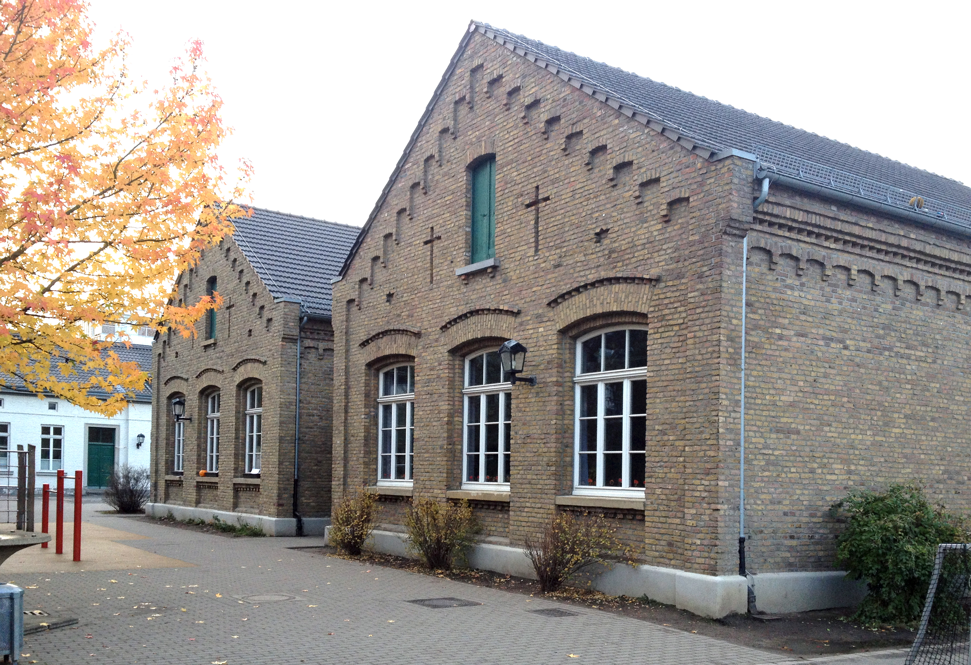 Mittelbau, Städt. Katholische Grundschule, Niederkasseler Straße 36, Düsseldorf (Niederkassel) 2